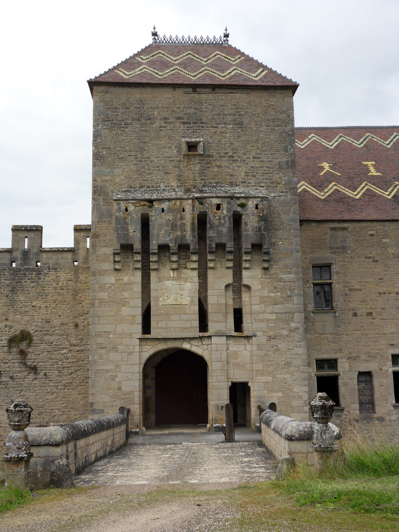 Marigny-le-Cahouët, Bourgogne, Côte-d'Or, Le château de Marigny-le-Cahouët : la porterie